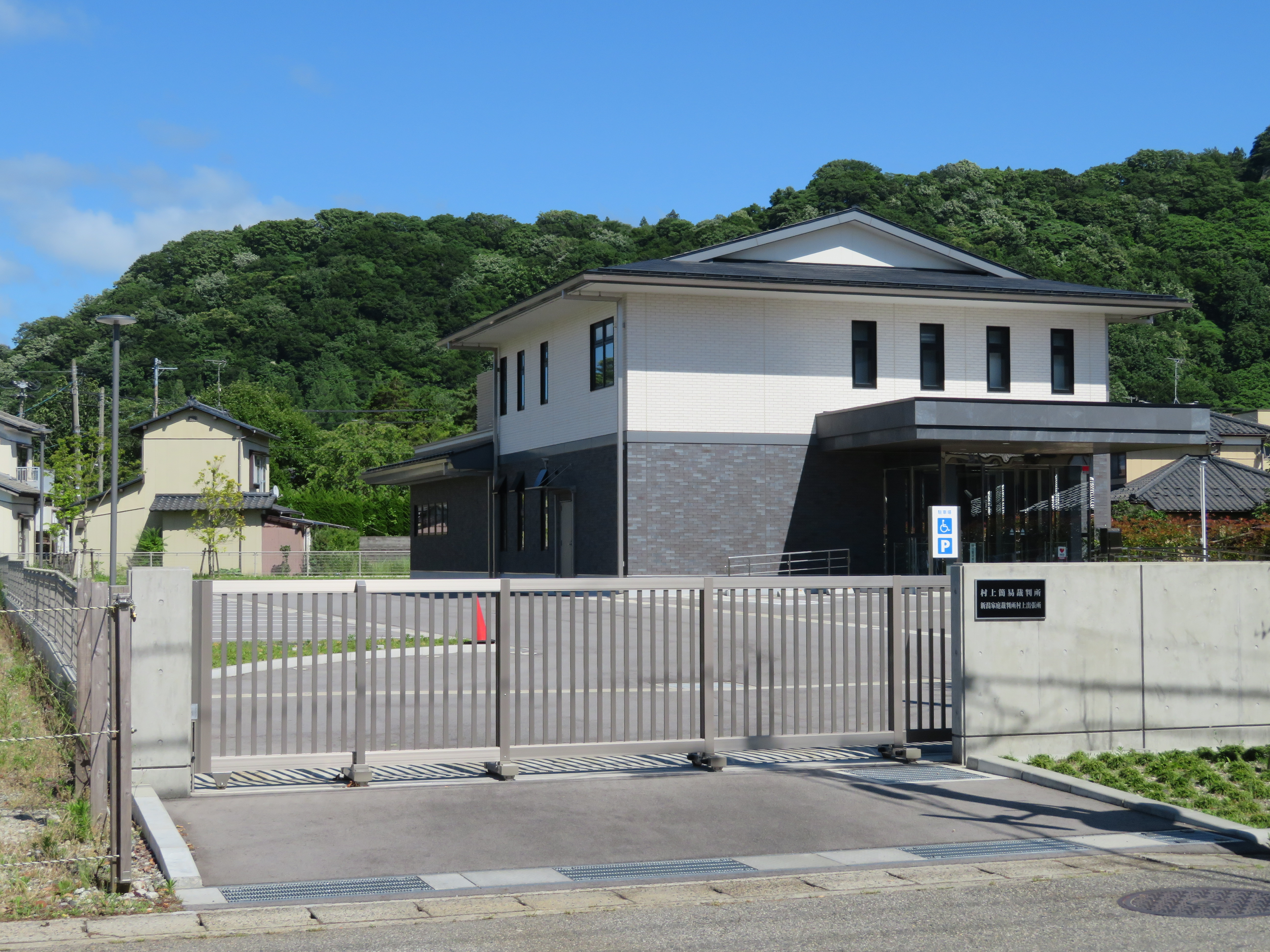 新潟県村上市に所在する村上簡易裁判所、新潟家庭裁判所村上出張所庁舎 Canon PowerShot SX720 HS